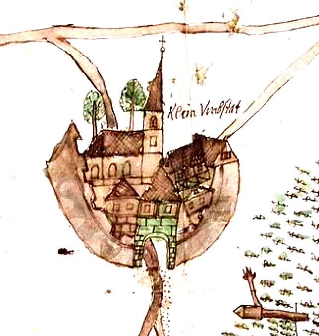 Zweite bildliche Darstellung von Klein-Umstadt von um 1600: aus "Kartenskizze des Grenzgangs um die Flur Grünheckerhof in der Gemarkung Klein-Umstadt mit Ansichten von Groß-Umstadt, Klein-Umstadt und Kleestadt" aus HStAD Bestand P 1: Nr. 620. Anmerkungen: Osten oben, die Wehrkirche, Fachwerkhäuser des alten Klein-Umbstat und das obere Torhaus der umgebenden Wehrmauer sind dargestellt. (Papier, Federzeichnung, koloriert)